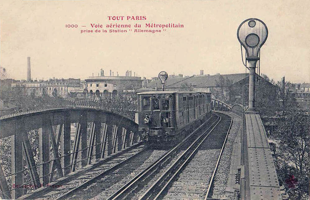 Paris - Voie aérienne du Métropolitain prise de la station Allemagne (actuellement Jaurès).